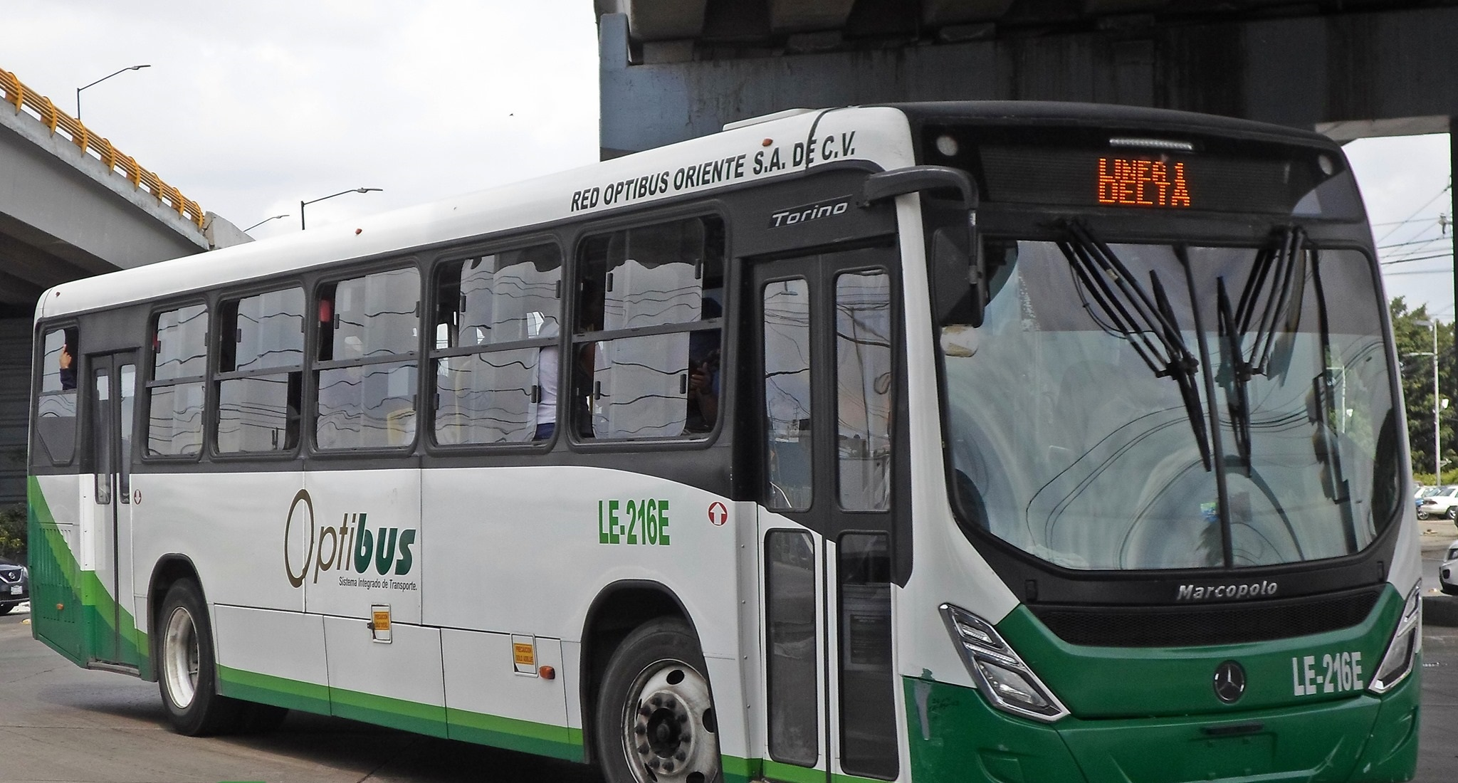 Desde finales del año 2018 se comenzaron a usar las unidades tipo padrón para las rutas troncales del Optibus donde se usan las unidades articuladas, posteriormente a comienzos del mes de octubre algunas unidades padrón empezaron circular en rutas normales.